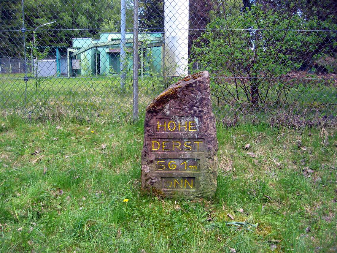 Ritterstein Nummer 301, Hohe Derst 561 M ü N N